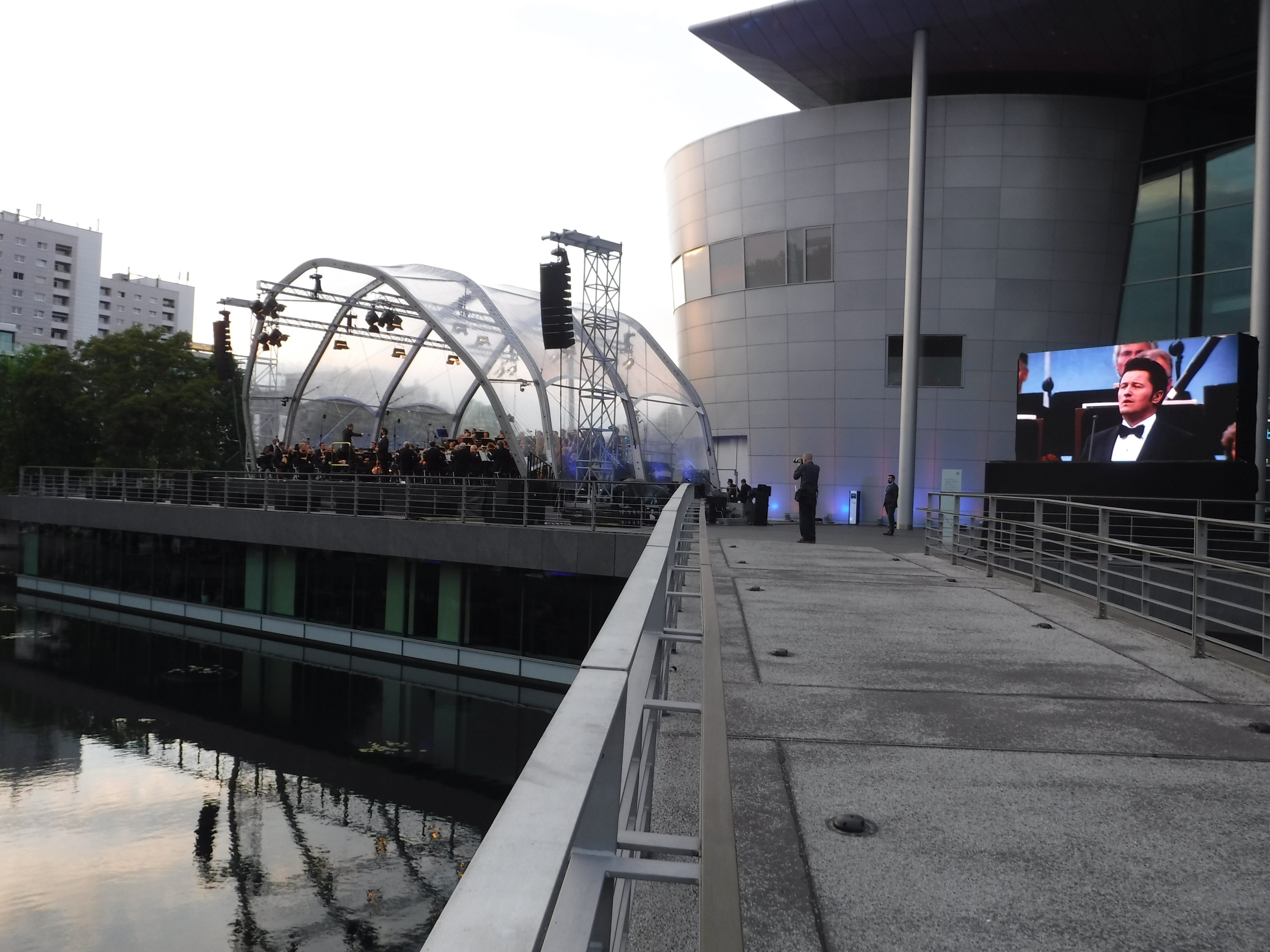 Klassik Picknickt 2018 an der Gläsernen Manufaktur